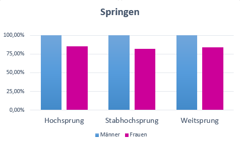 100% beschreibt jeweils die Zeit des männlichen Rekordes.